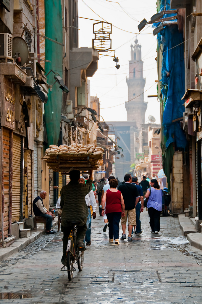 Egypt